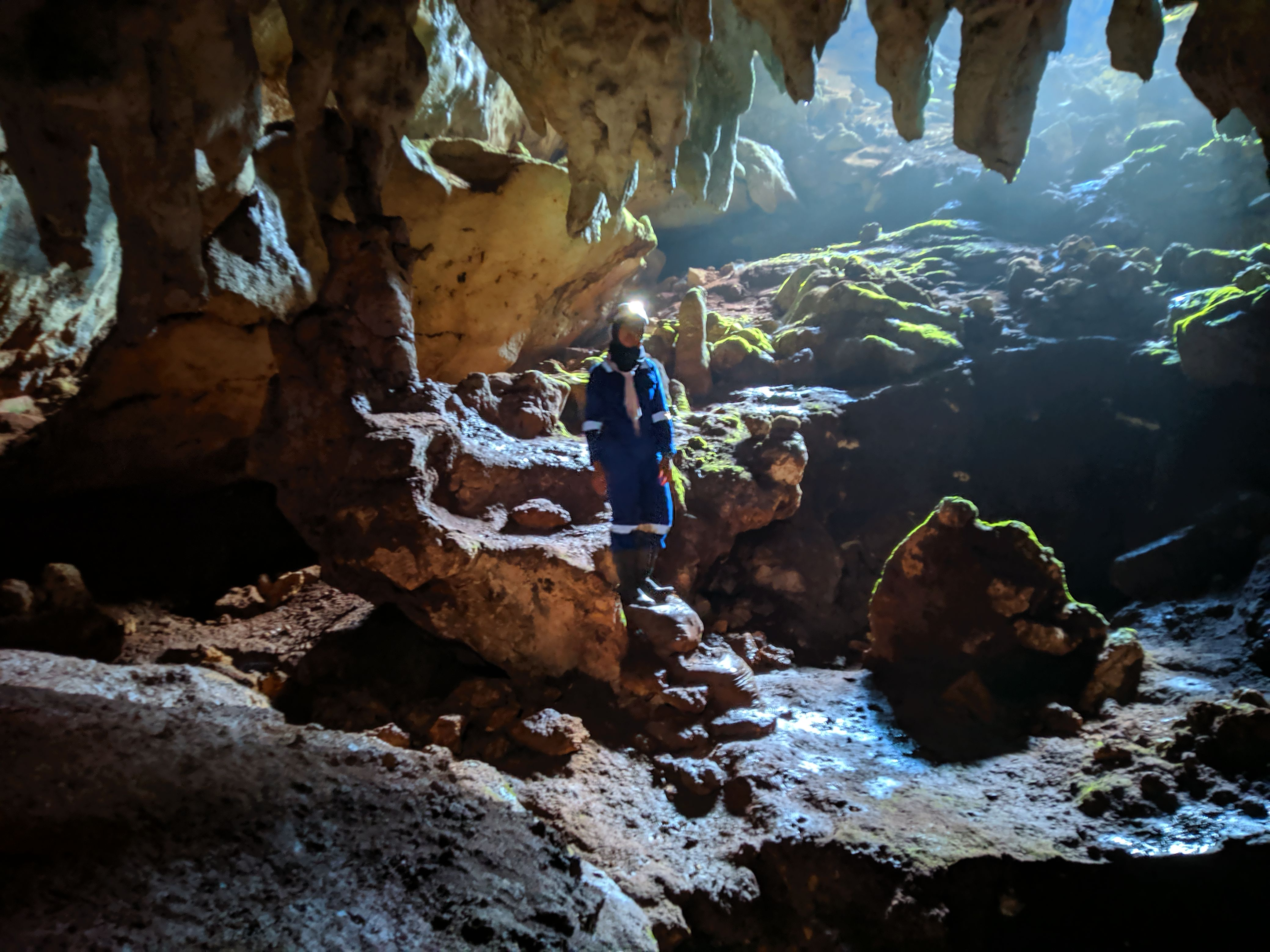 Salah satu goa tempat belajar ilmu speleologi di indonesi